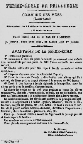 Affiche d'inforamtion sur la ferme école de Pallerols (Commune de Mées, Alpes Maritimes)